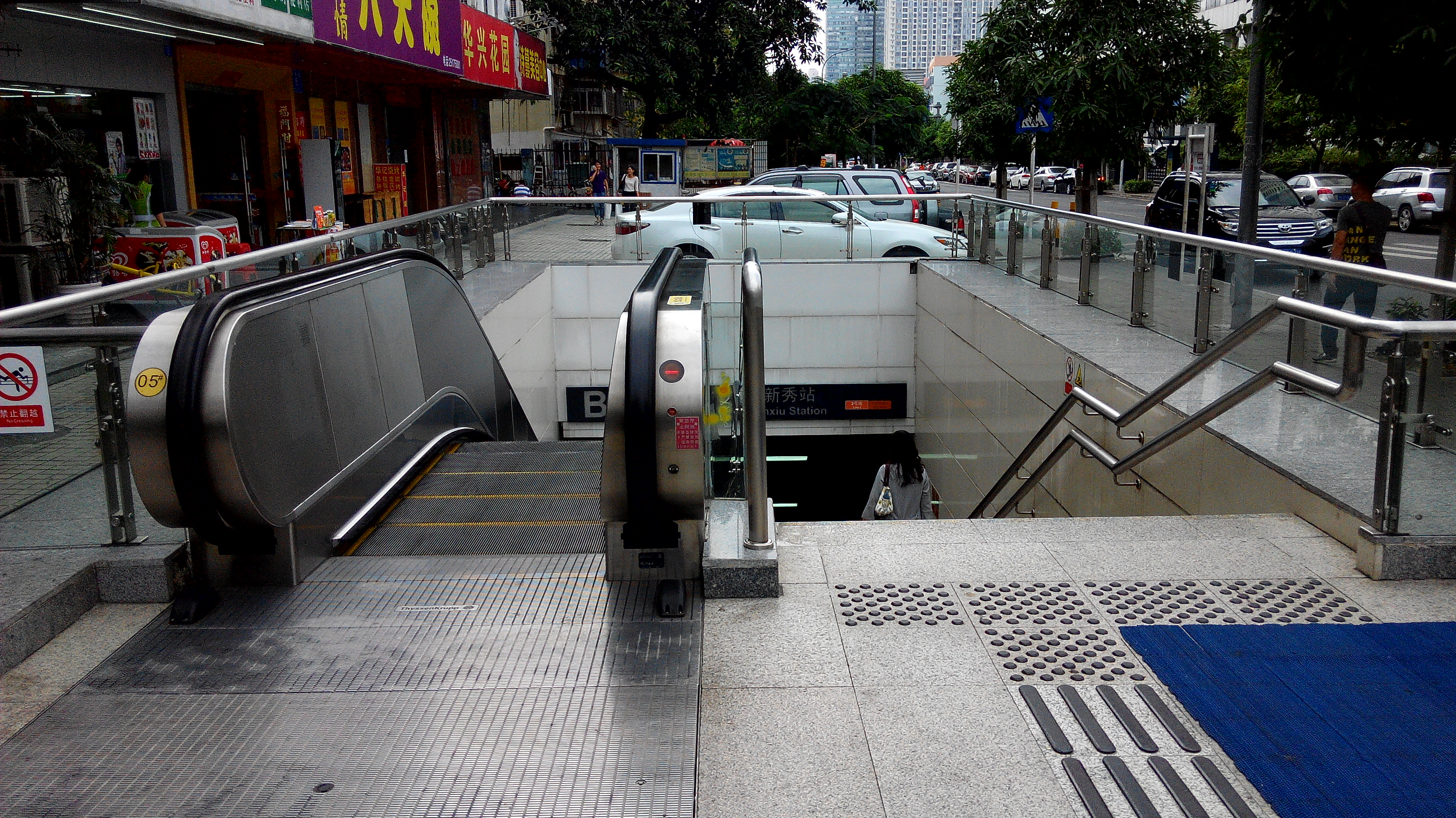 深圳地铁新秀站B出口于2014年的摄影